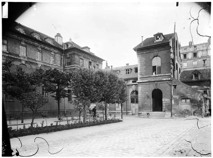 Vue sur cour